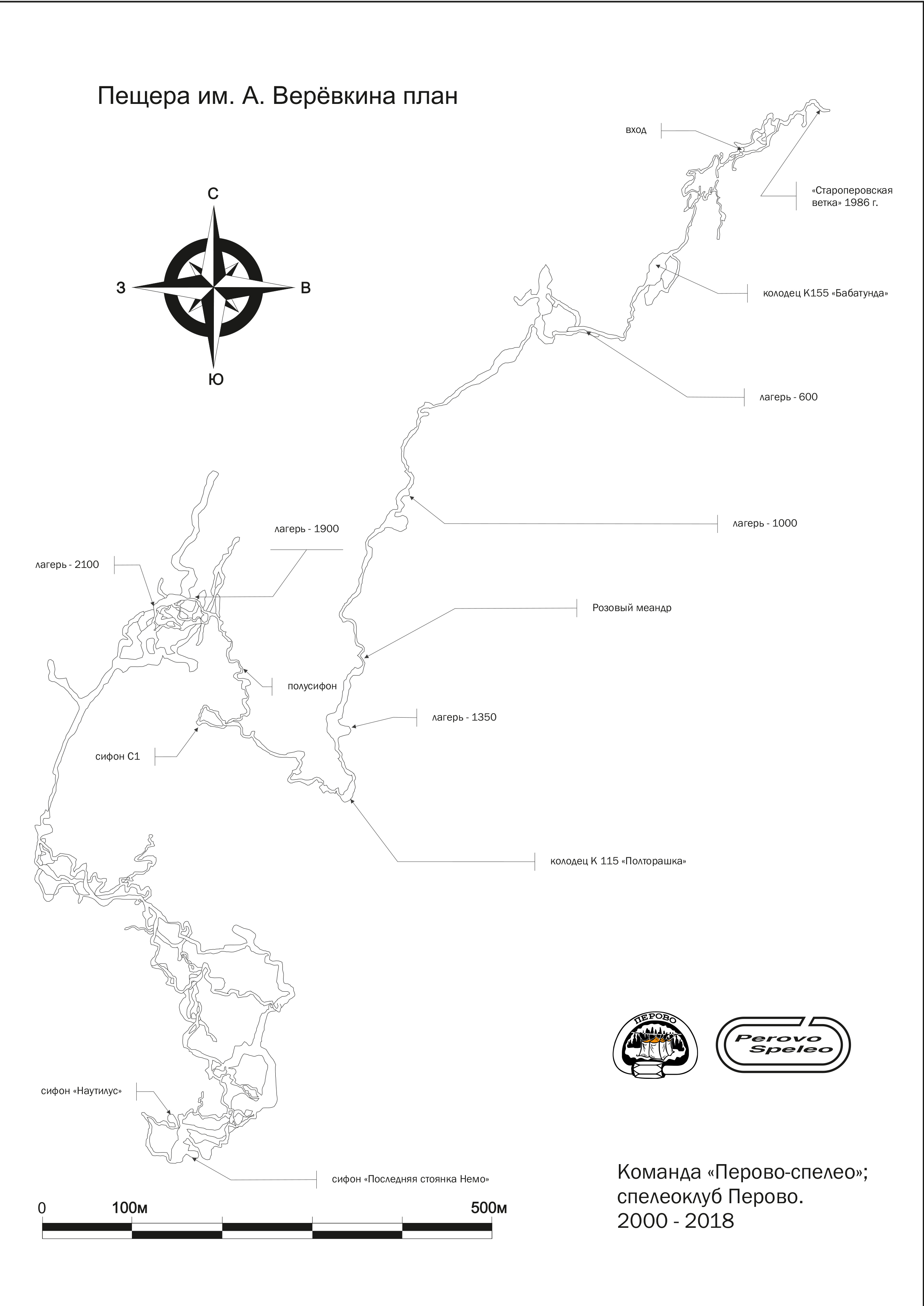 Составлен по данным топосъёмки команды Перово-спелео и спелеоклуба Перово на август 2017.